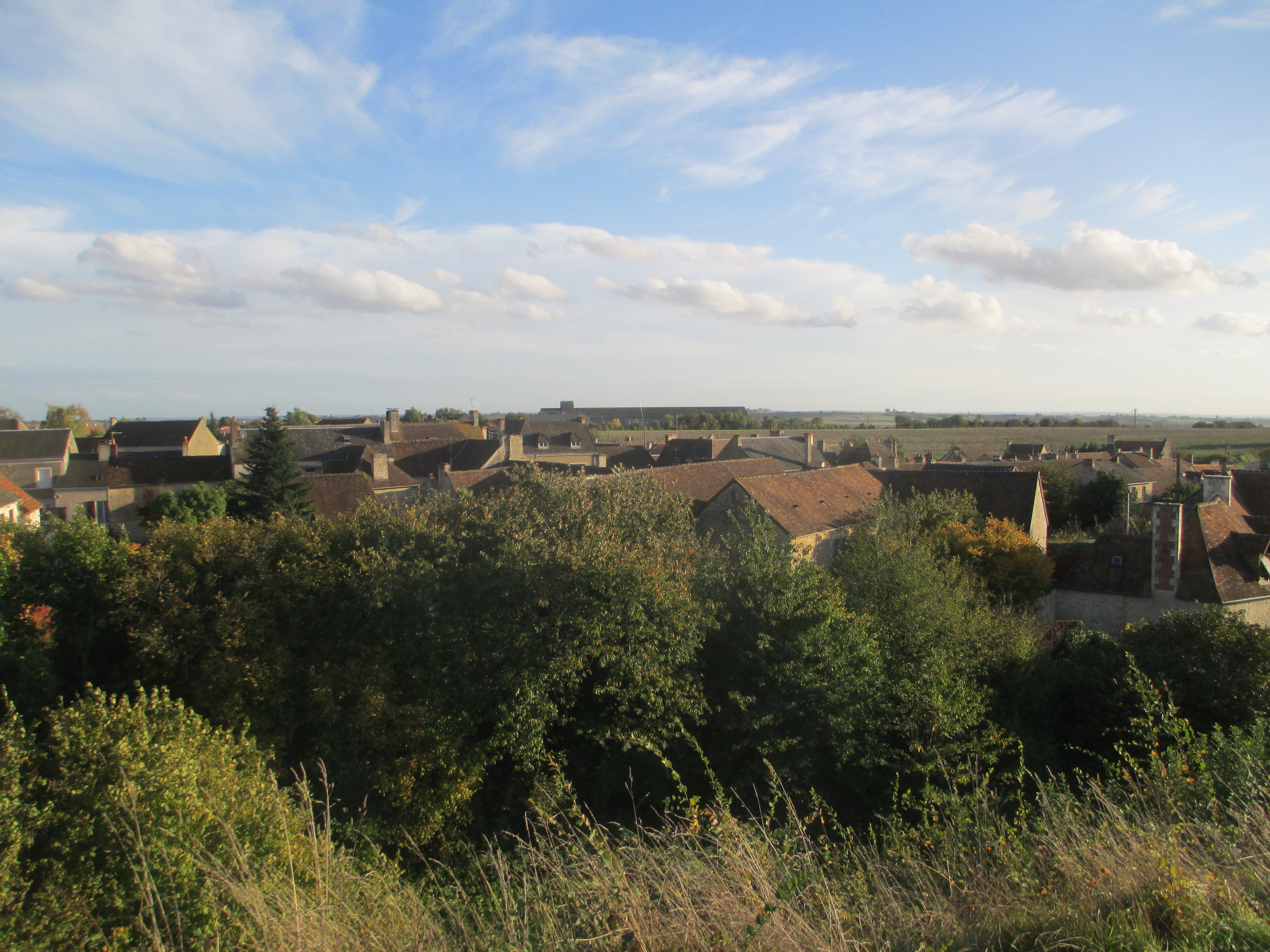 Saint-Rémy-du-Val, dans la Sarthe.